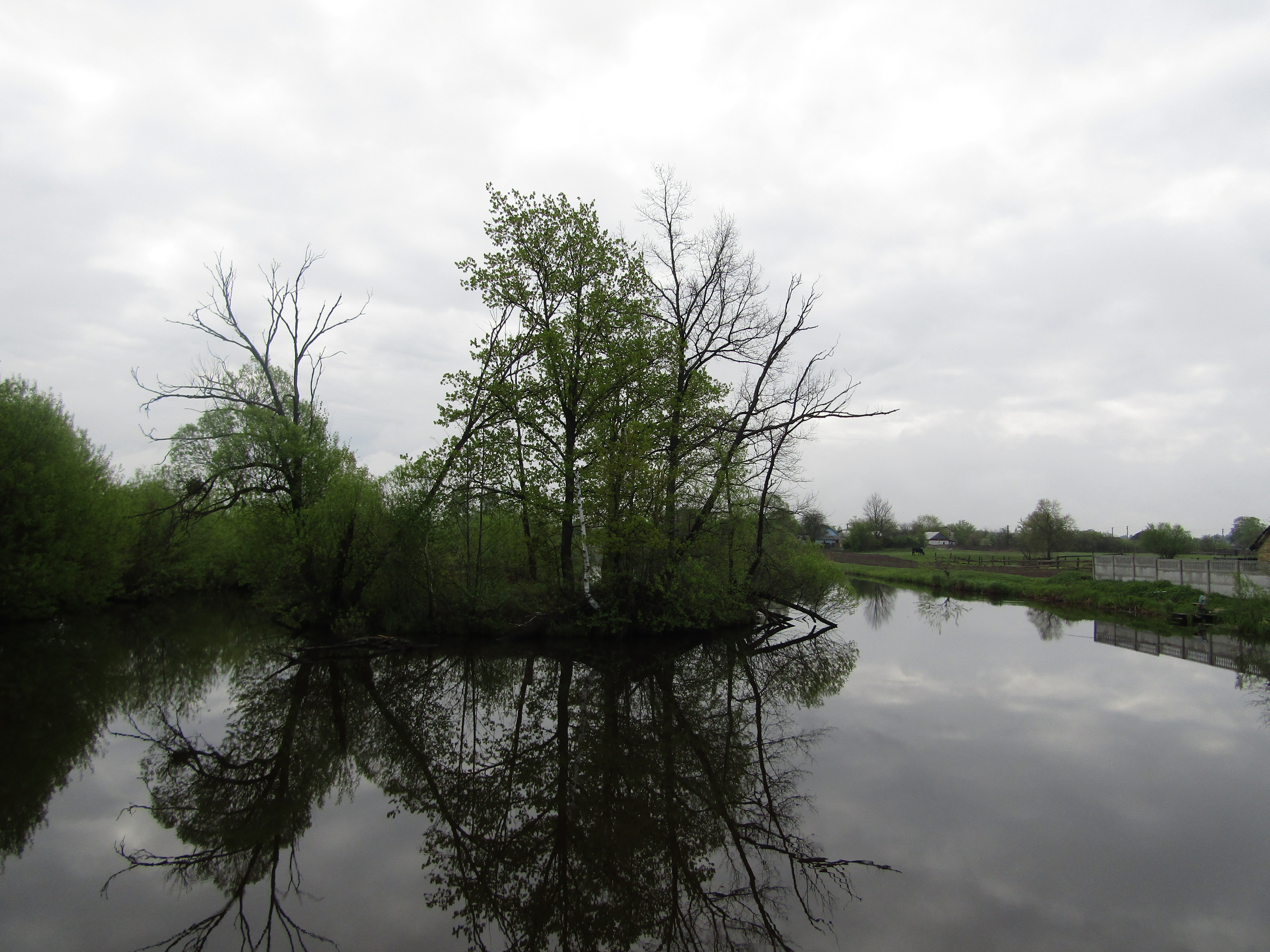 Ставок на річці Трость в с. Володимирівка, фото 2019 р.